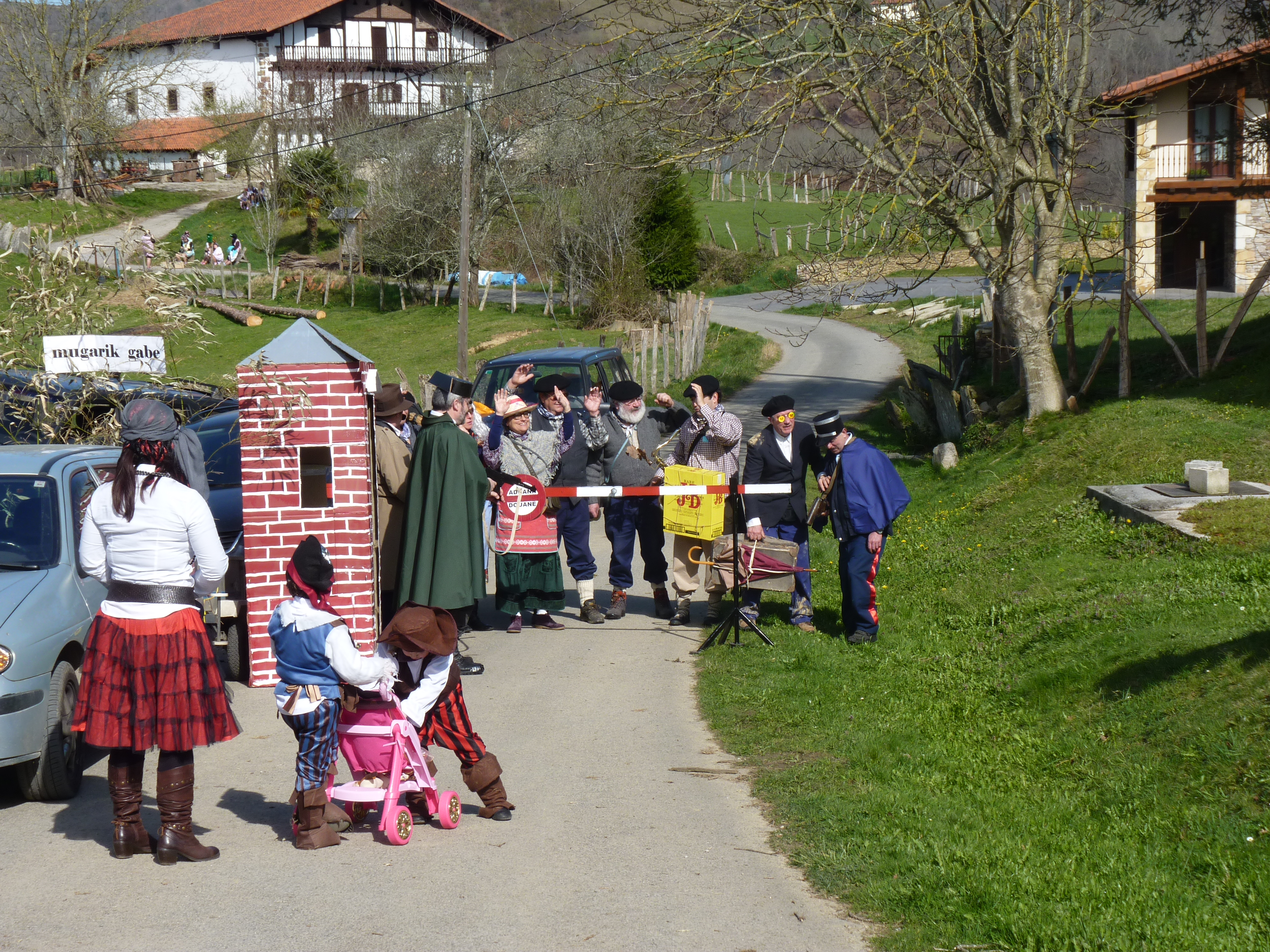 Zingar-arrautze eskea Beran.